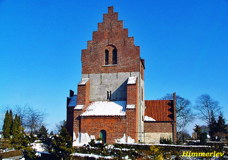 fra vest